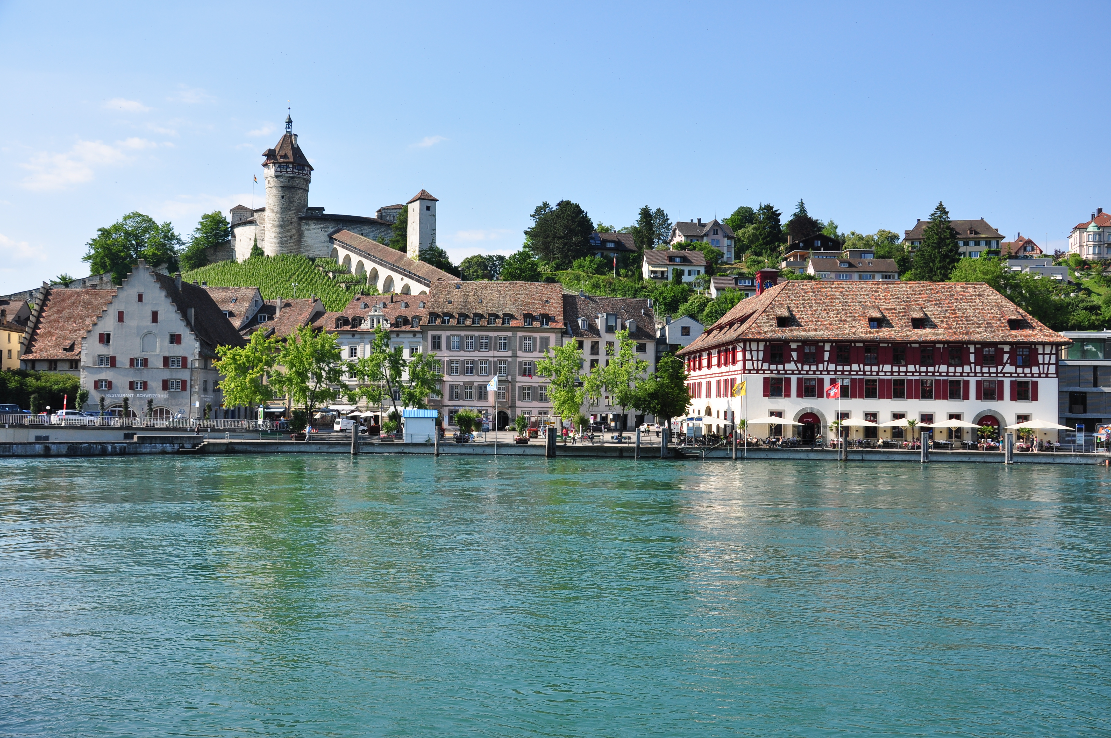 Schaffhausen and Rhein (Switzerland), as seen from Feuerthalen, Munot in the background.